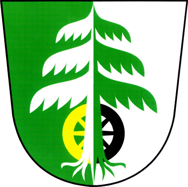 Česky: znak obce Radvanice